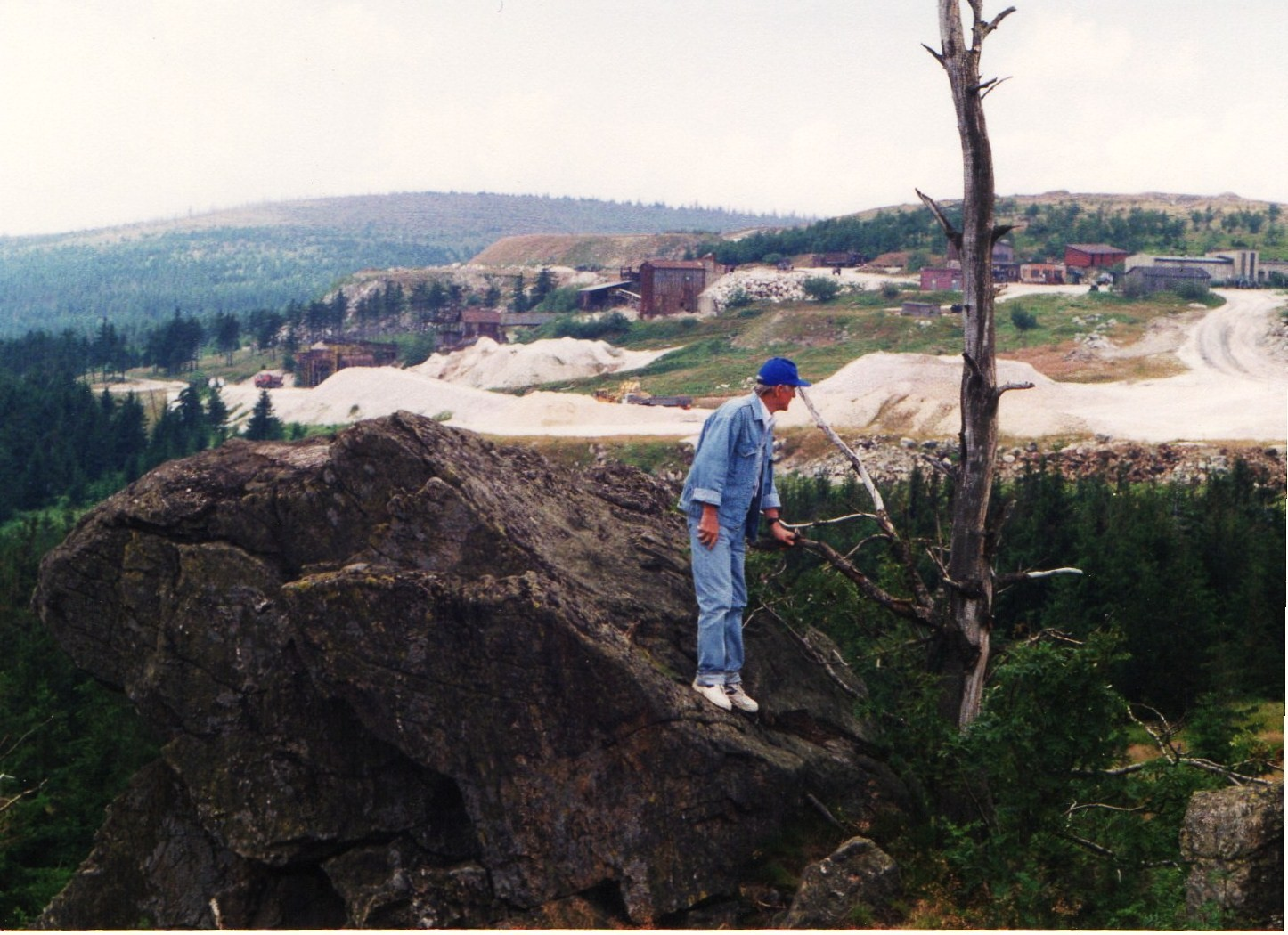 Widok ze Zwaliska na Wysoką Kopę i kopalnię kwarcu Stanisław w 1997r.